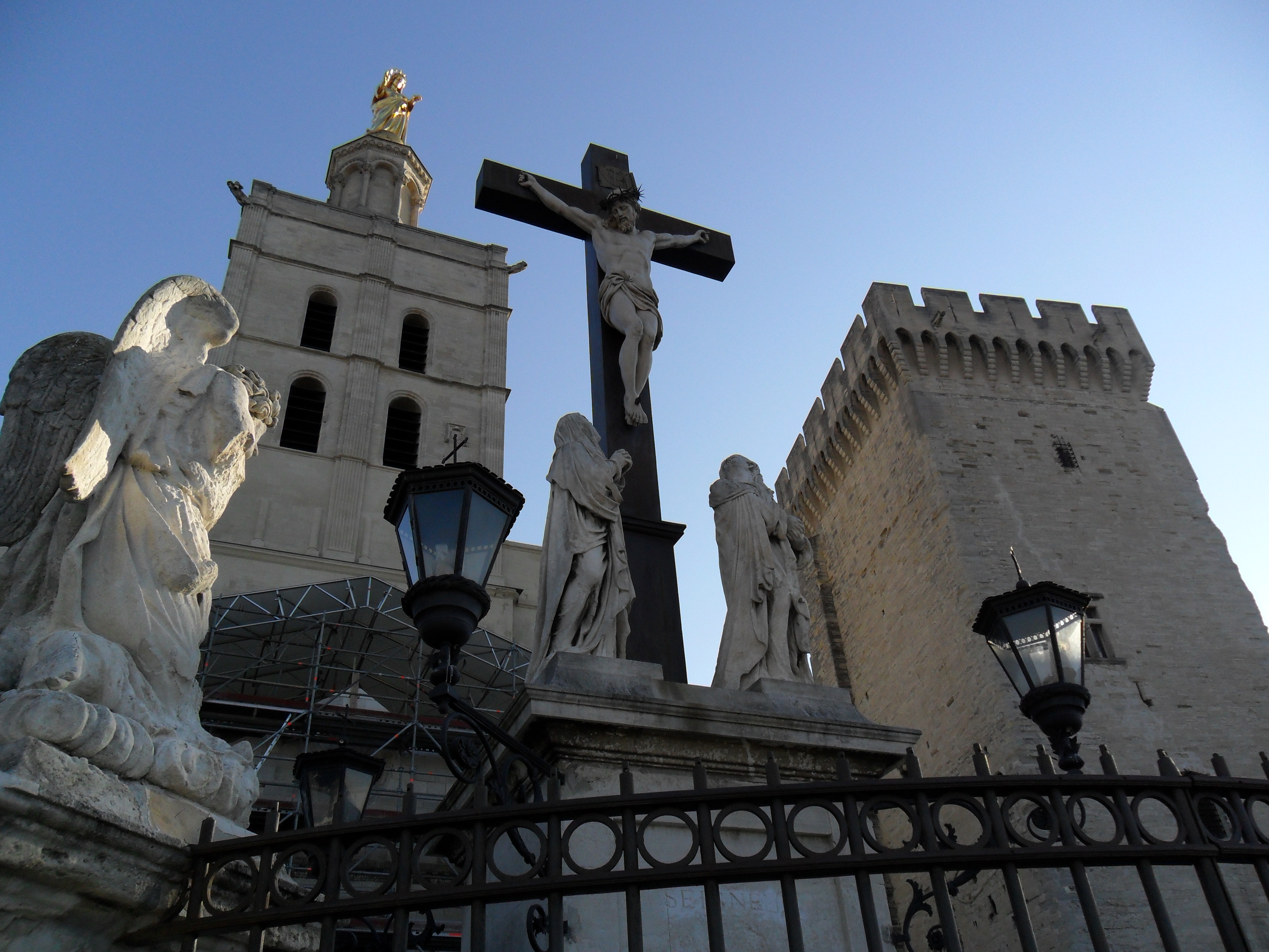 Cathédrale Notre-Dame des Doms d'Avignon